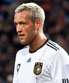 Julian Schieber im Trikot der deutschen U-21-Nationalmannschaft.